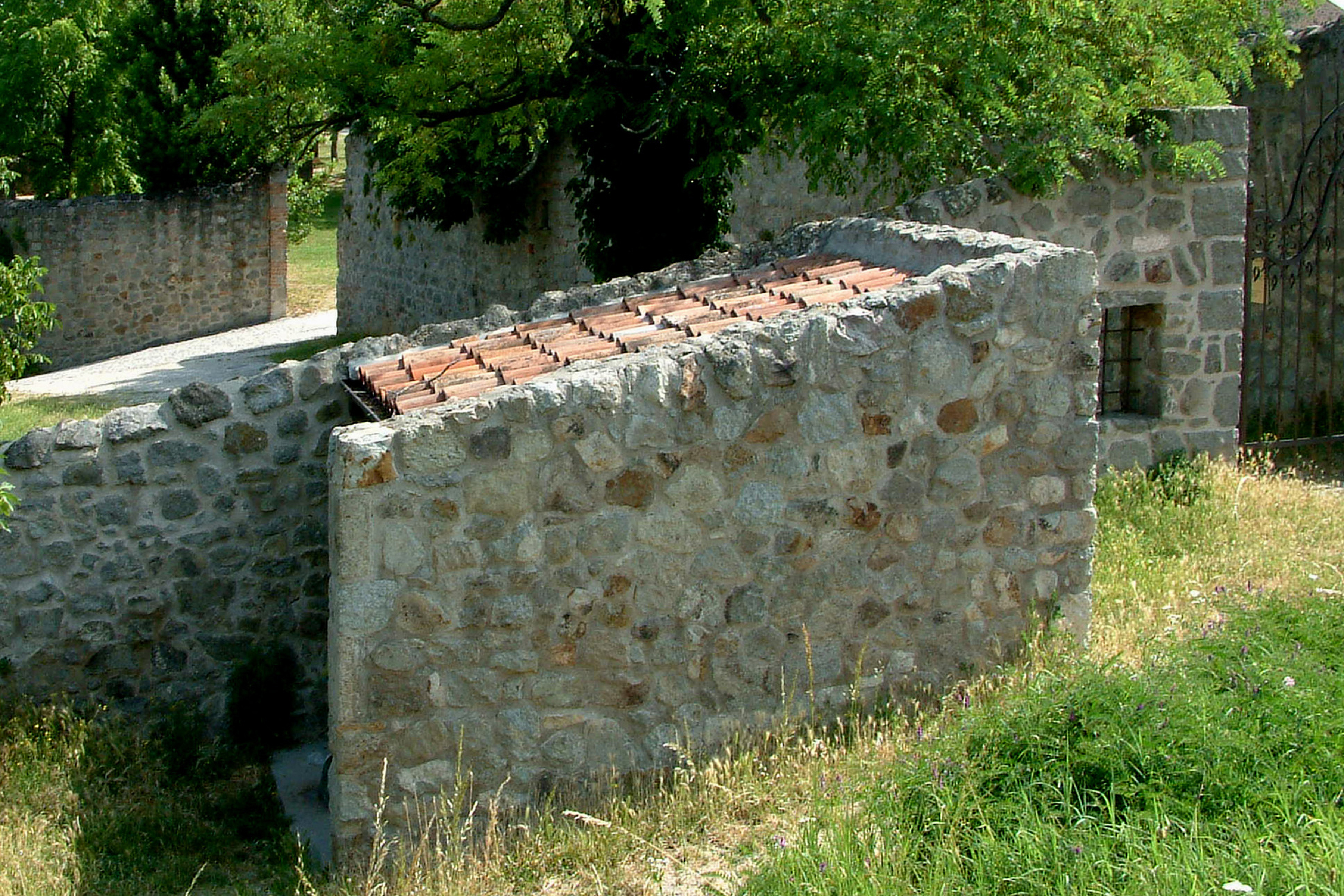 Servizi igienici annessi a Villa Beatrice sui Colli Euganei